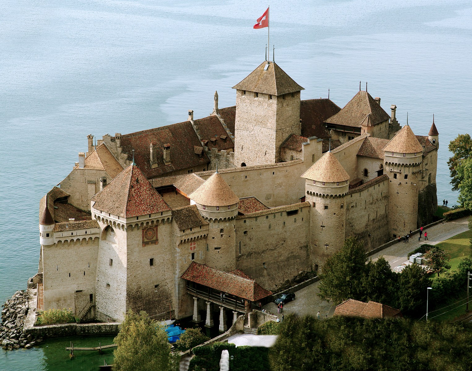 Le château de Chillon vu du viaduc de l'A9